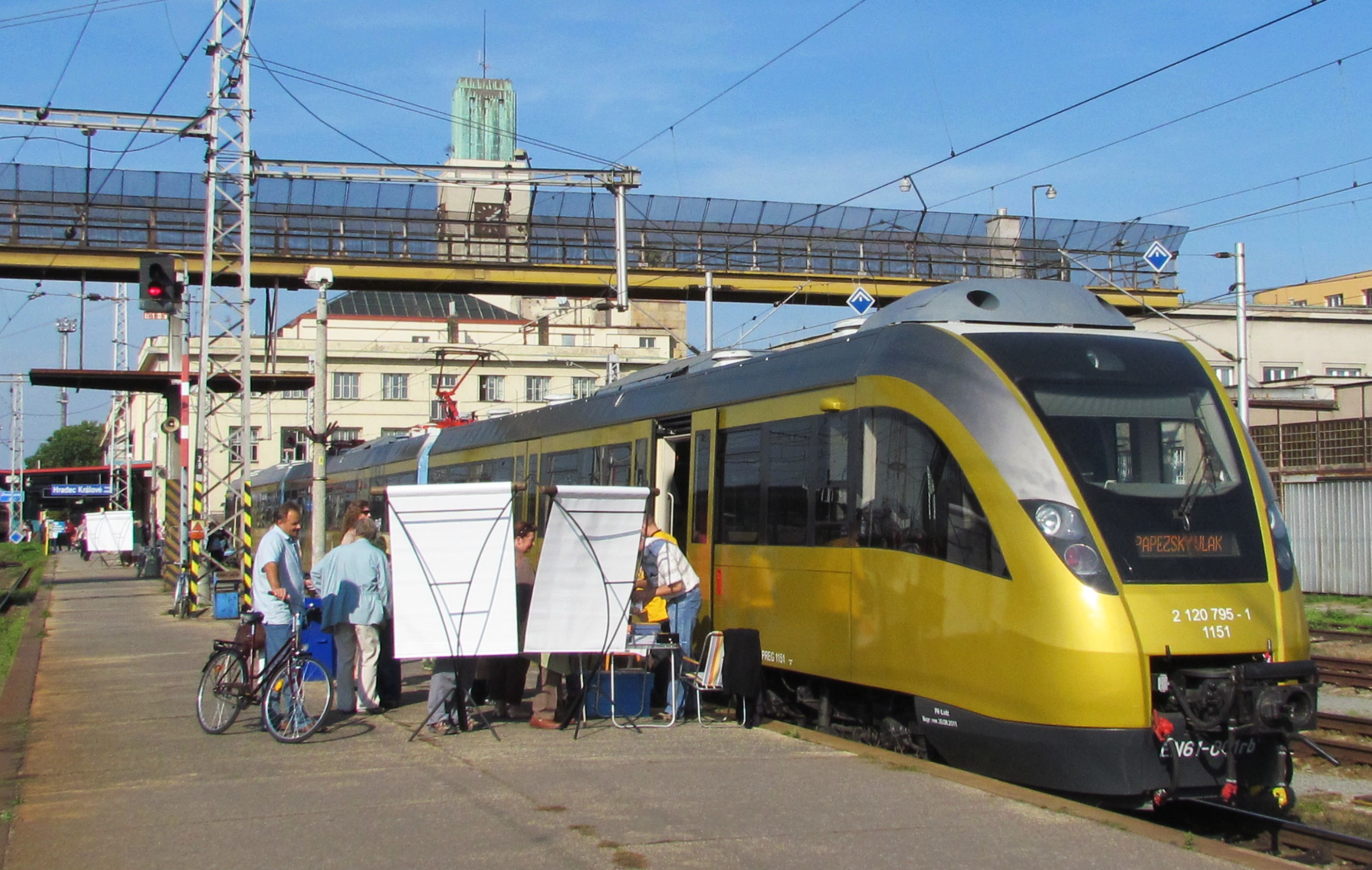 Papežský vlak Jana Pavla II. "Totus tuus" na královéhradeckém hlavním nádraží.